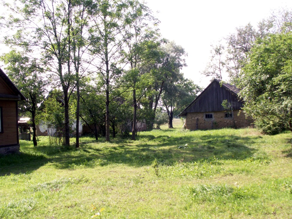 Povilo Jakubėno gimtoji sodyba Vaitkūnuose